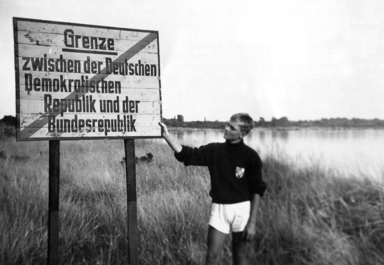 Der junge Holger Ellgaard am Grenzschild beim Priwall (Travemünde)